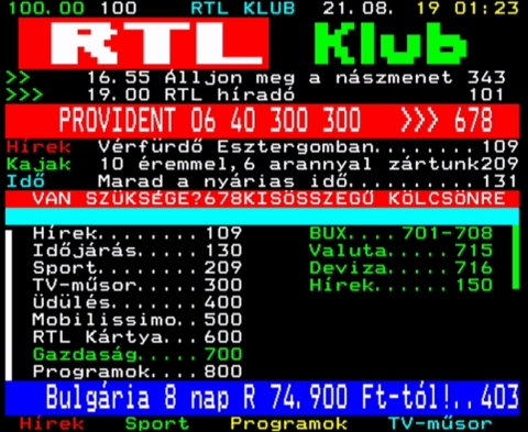 Az RTL Klub teletextje